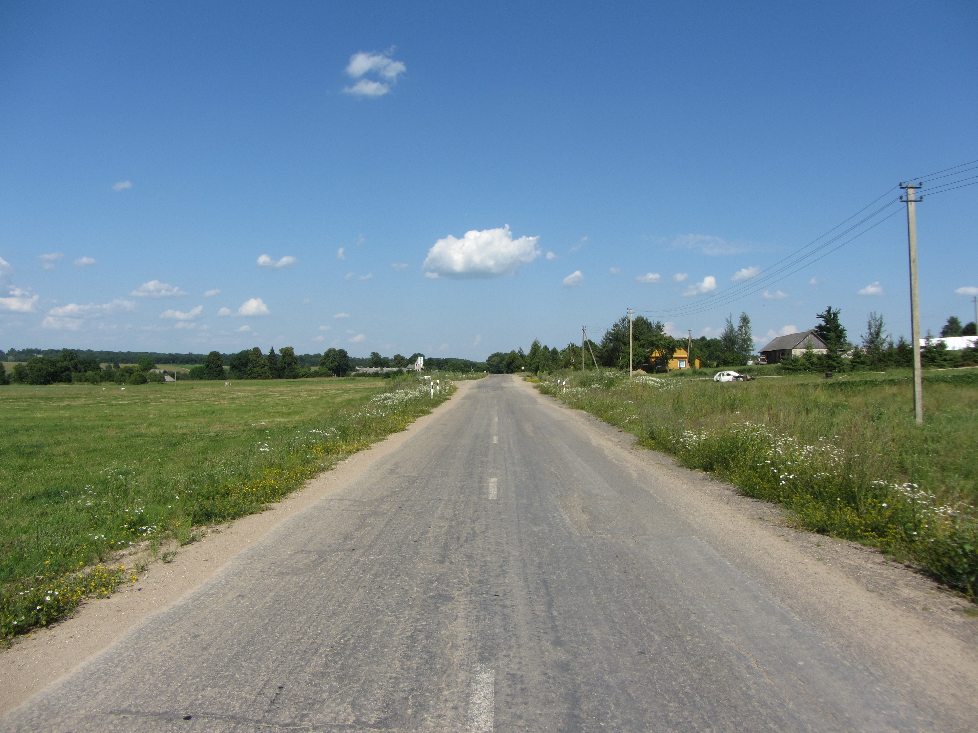 Laičiai 33314, Lithuania